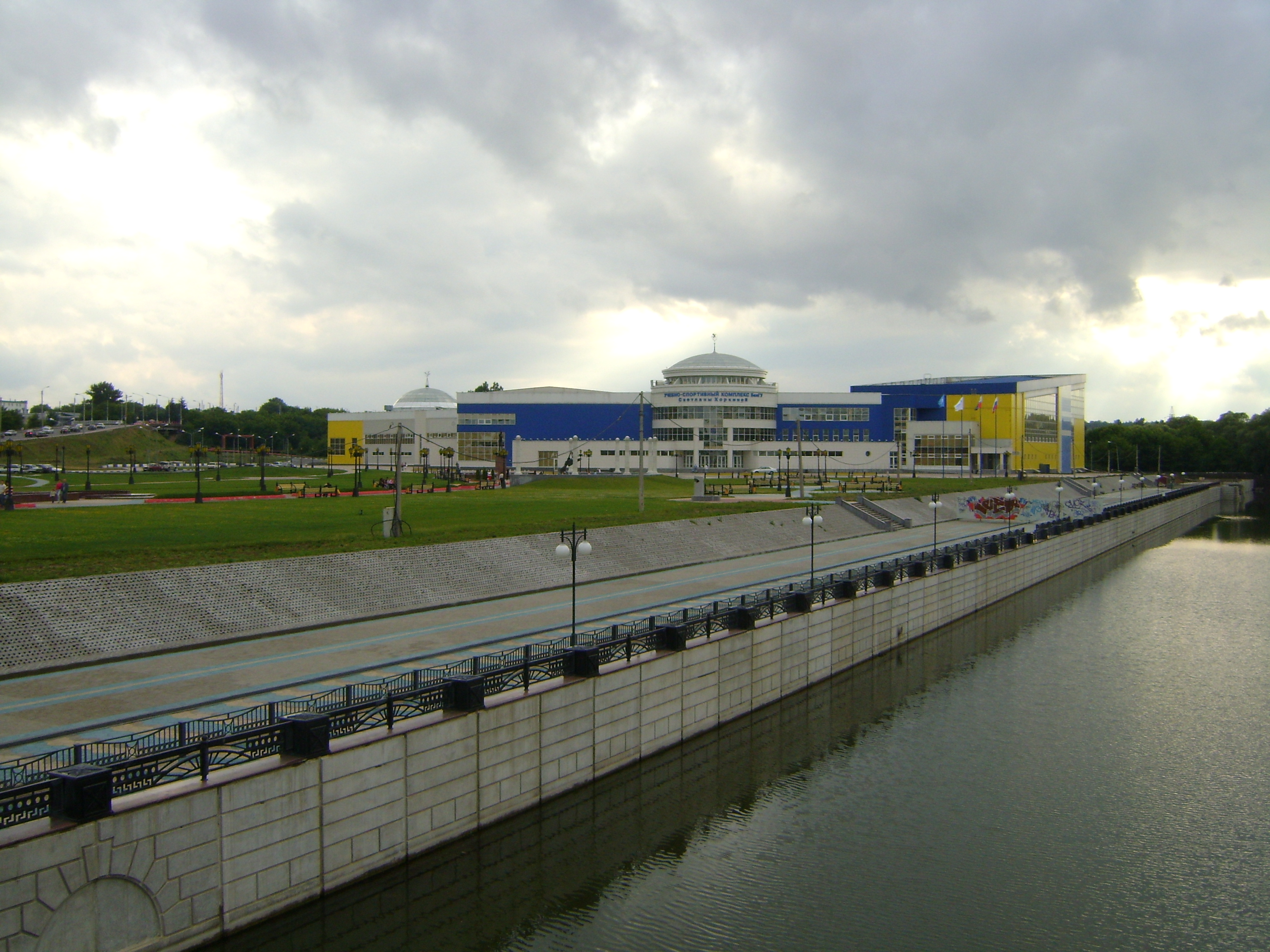 Вид от реки Везелки на Комплекс Светланы Хоркиной